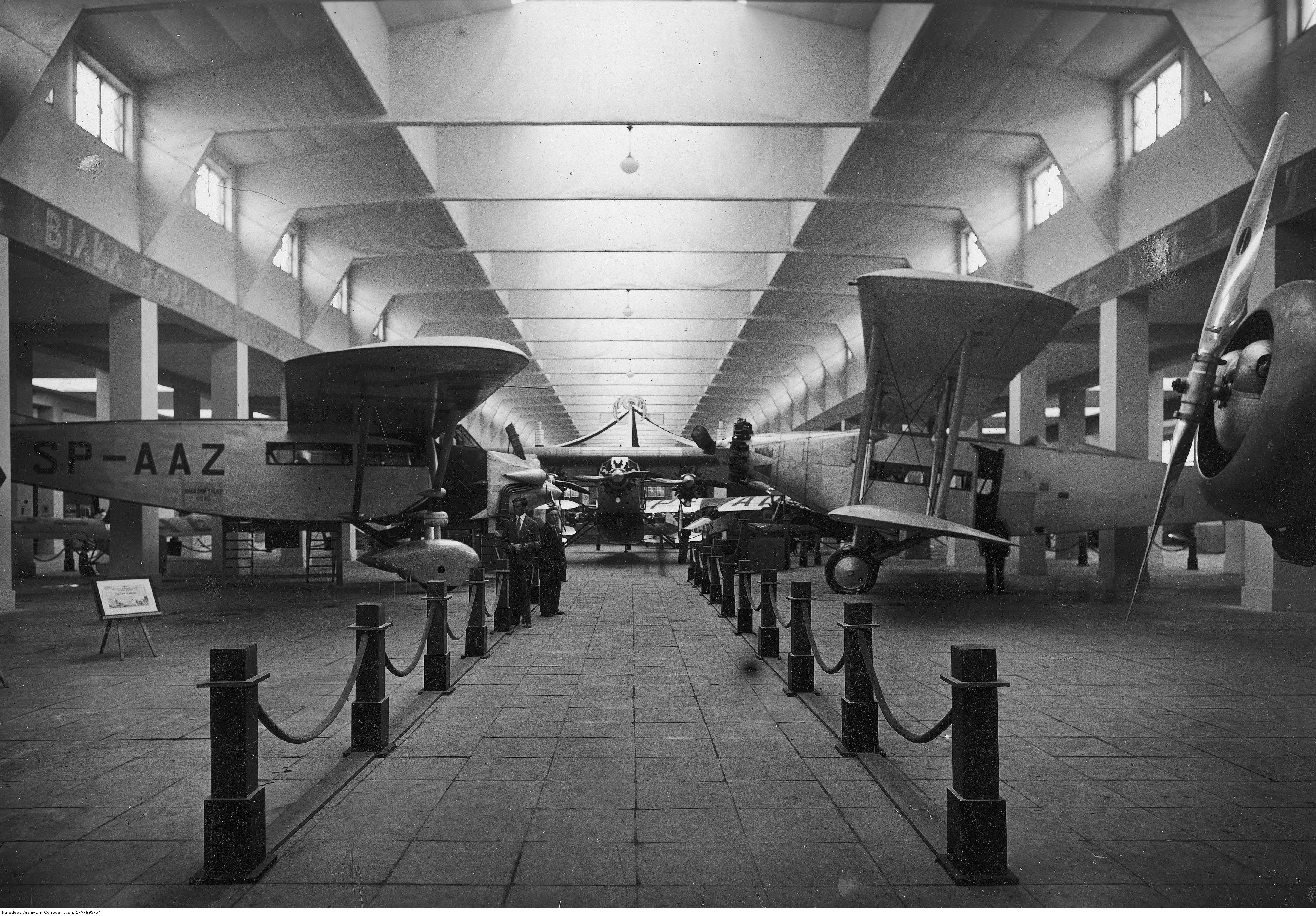 Dział lotniczy Międzynarodowej Wystawy Komunikacji i Turystyki w Poznaniu. Na pierwszym planie widoczne samoloty: PWS-20T o znaku rejestracyjnym SP-AAZ (z lewej) i Lublin R-IX (z prawej).